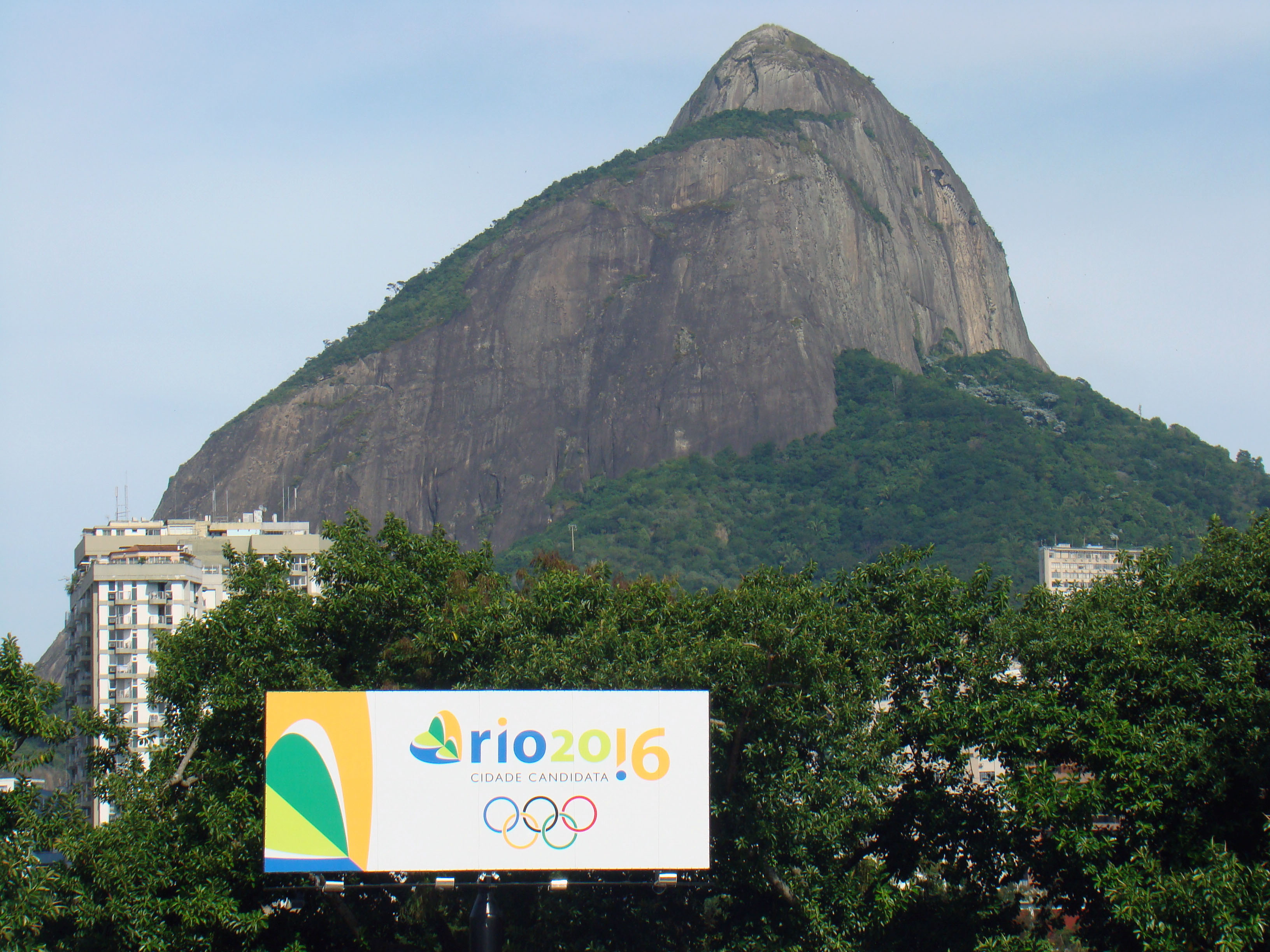 Placas promovendo a candidatura do Rio de Janeiro aos Jogos Olímpicos de 2016.